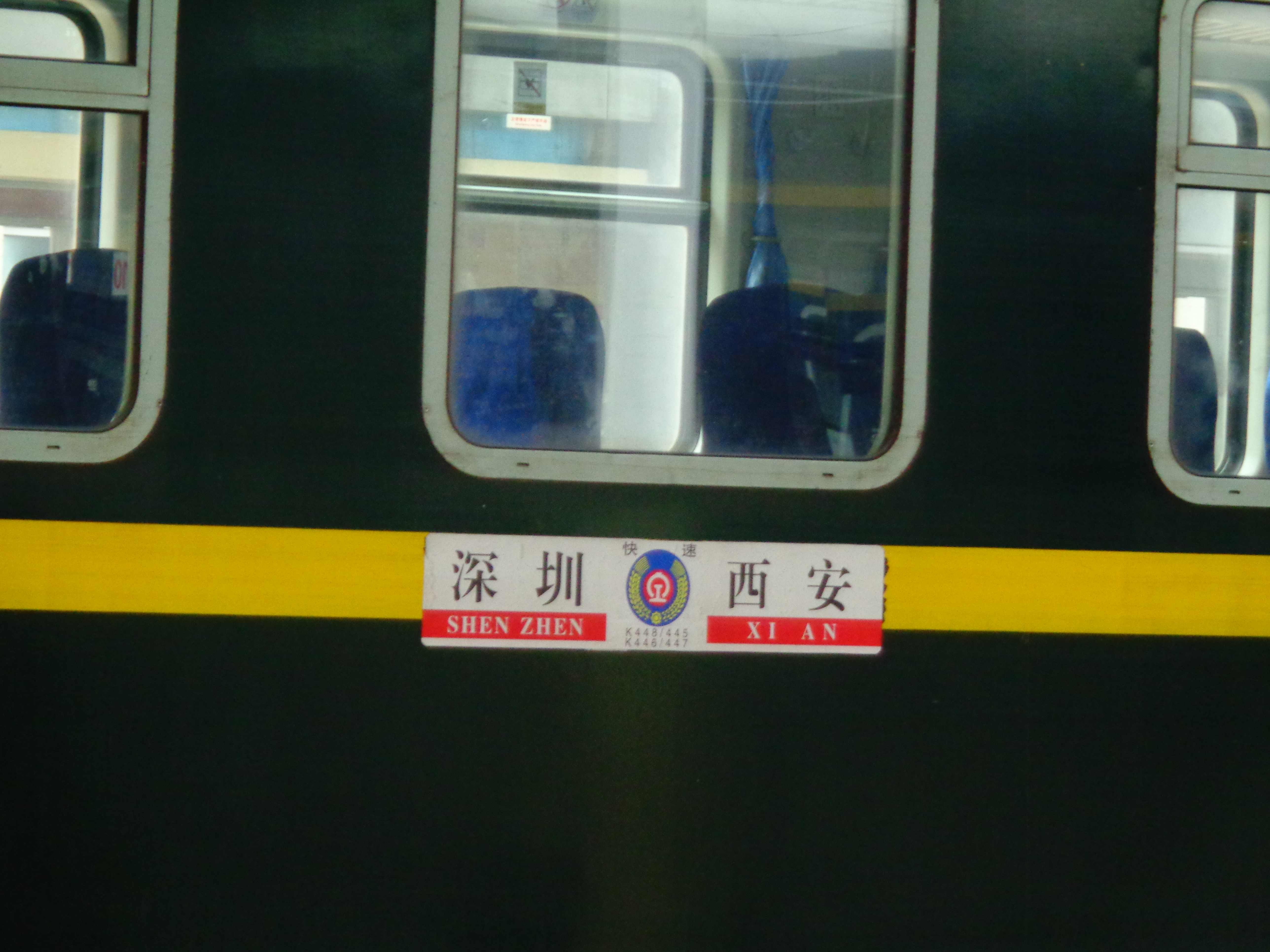 西安站 深圳-西安水牌